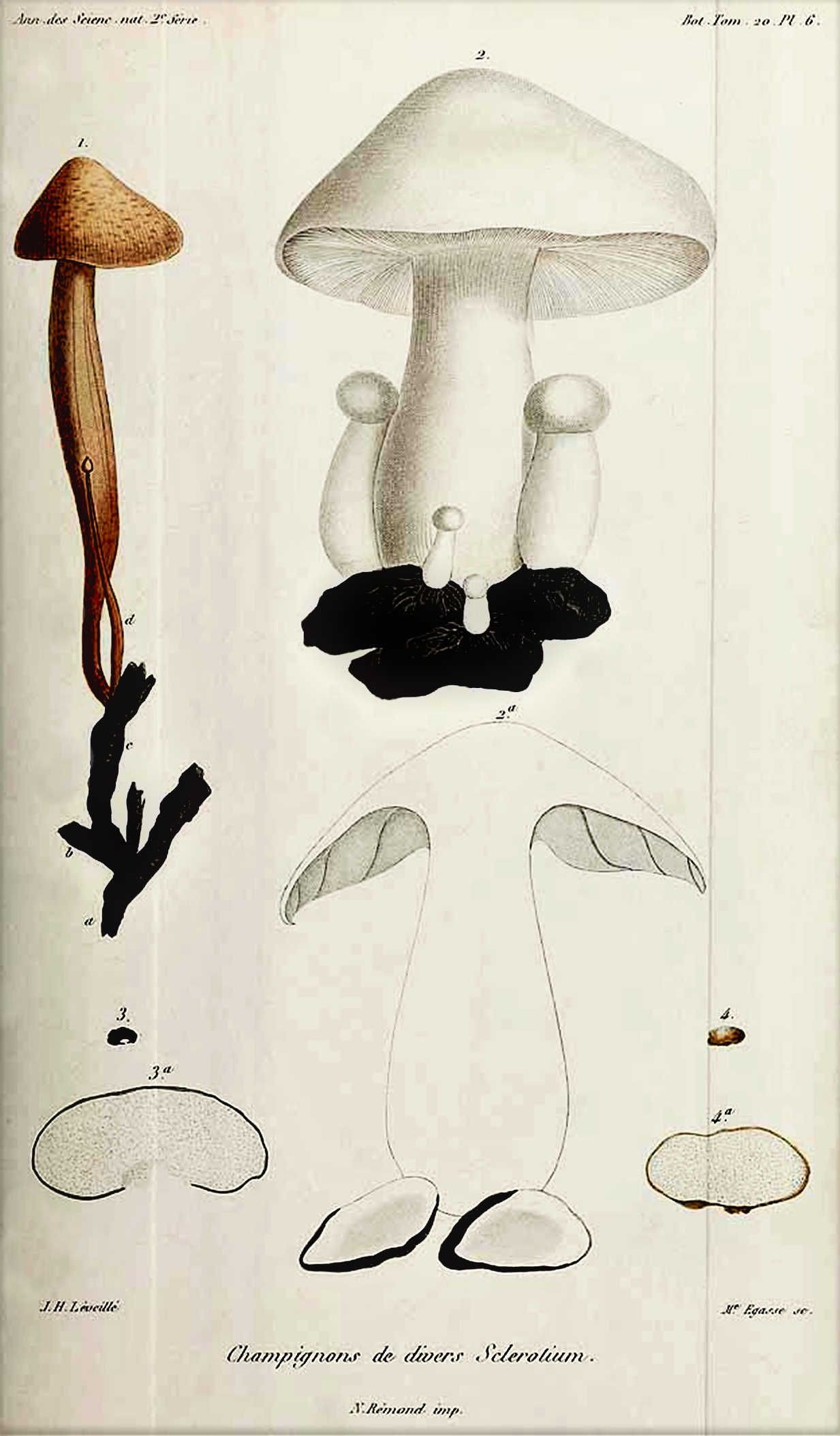 Sclerotium semen (Typhula variabilis) auf Agaricus fusipes (Gymnopus fusipes) und Agaricus grossus (Amanita grossa)